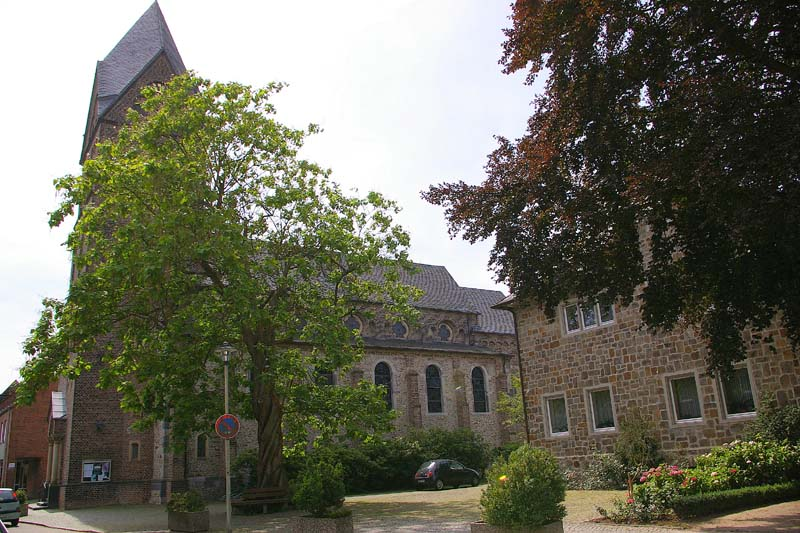 Kath. Kirche St. Agnes, Angermund